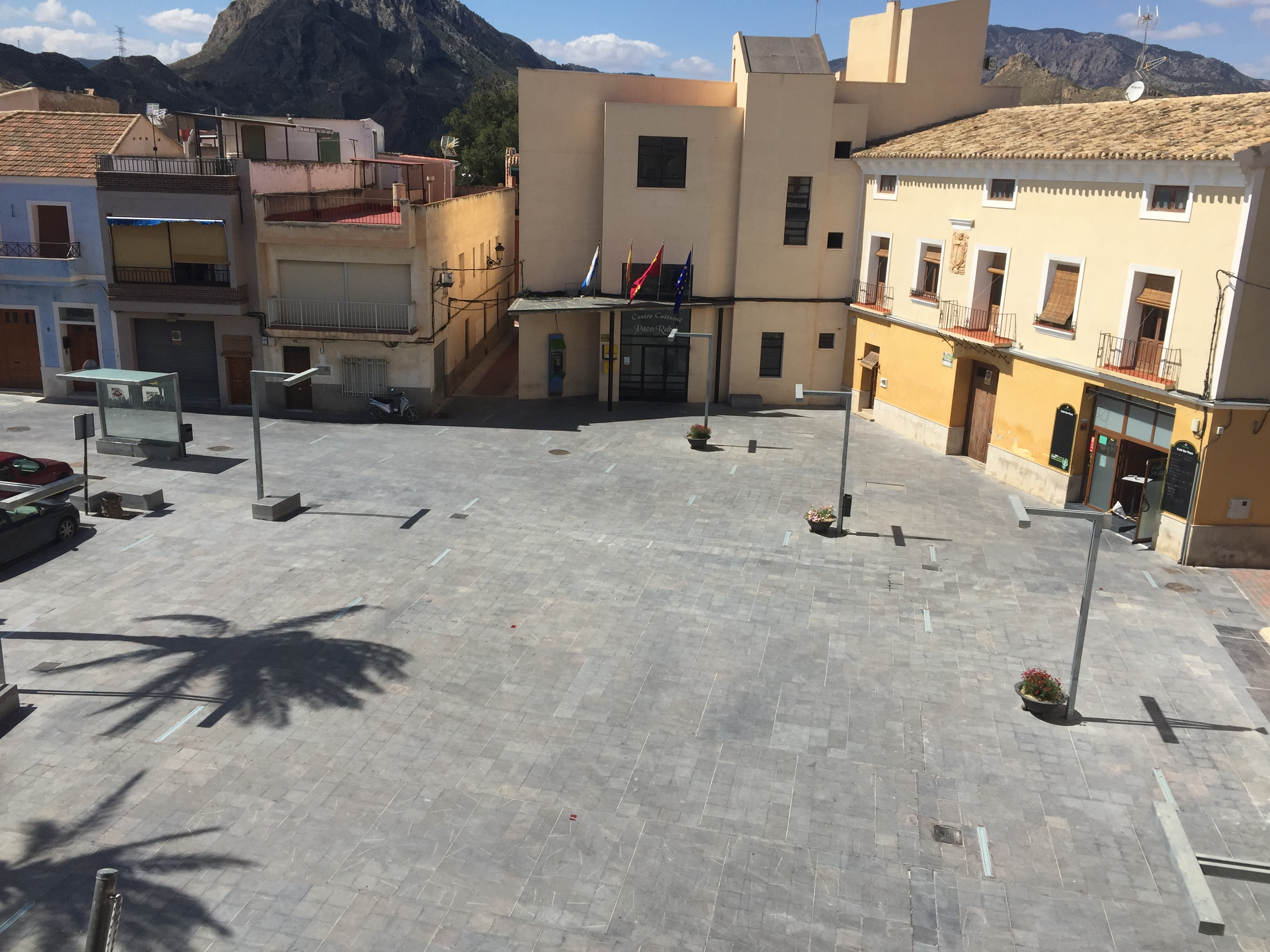 Plaza Constitución villanueva del rio segura